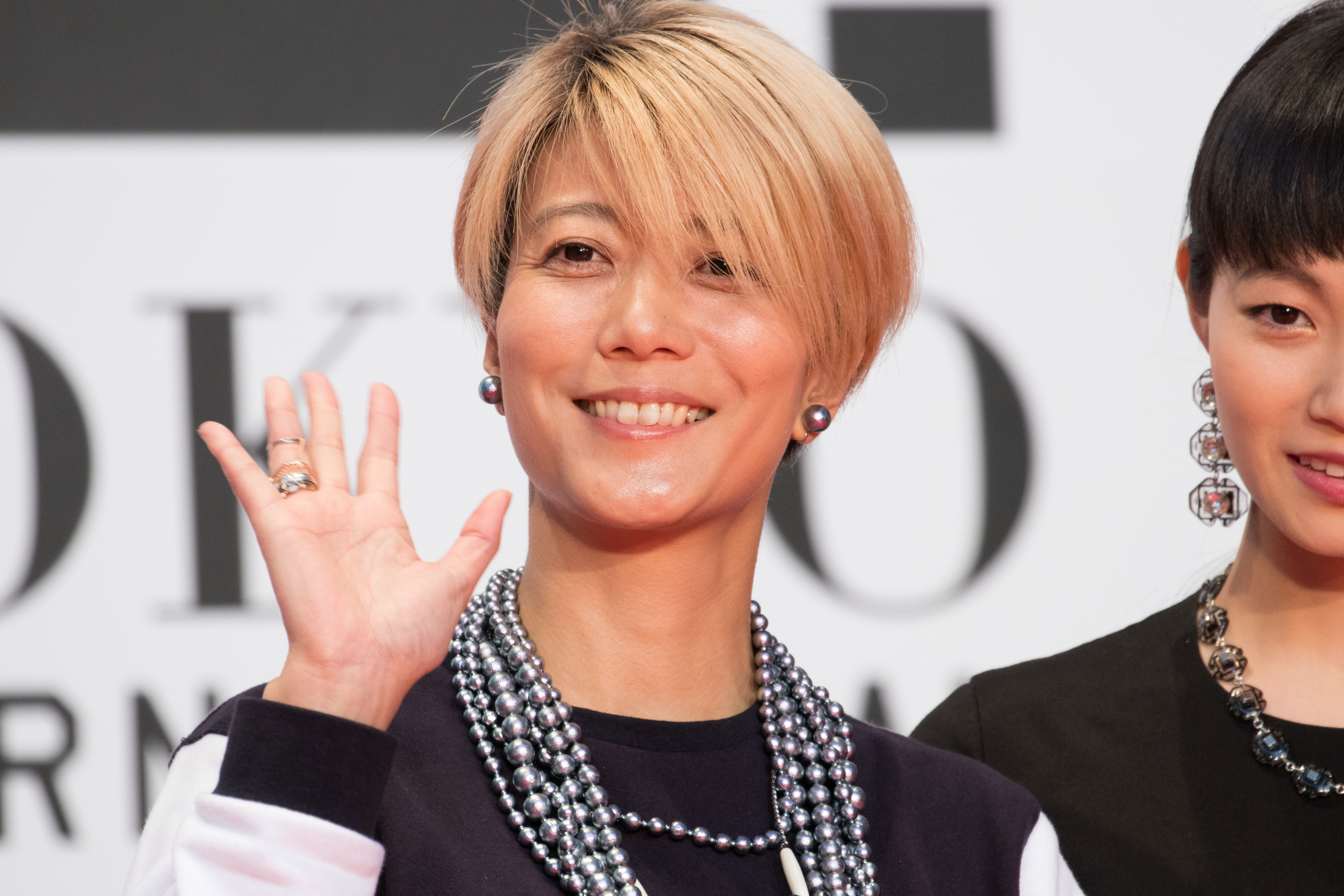 第29回 東京国際映画祭 オープニングセレモニー 三島有紀子 (少女)